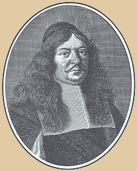 Christian Hoffmann von Hoffmannswaldau (1616-1679) Sonstiges: ...